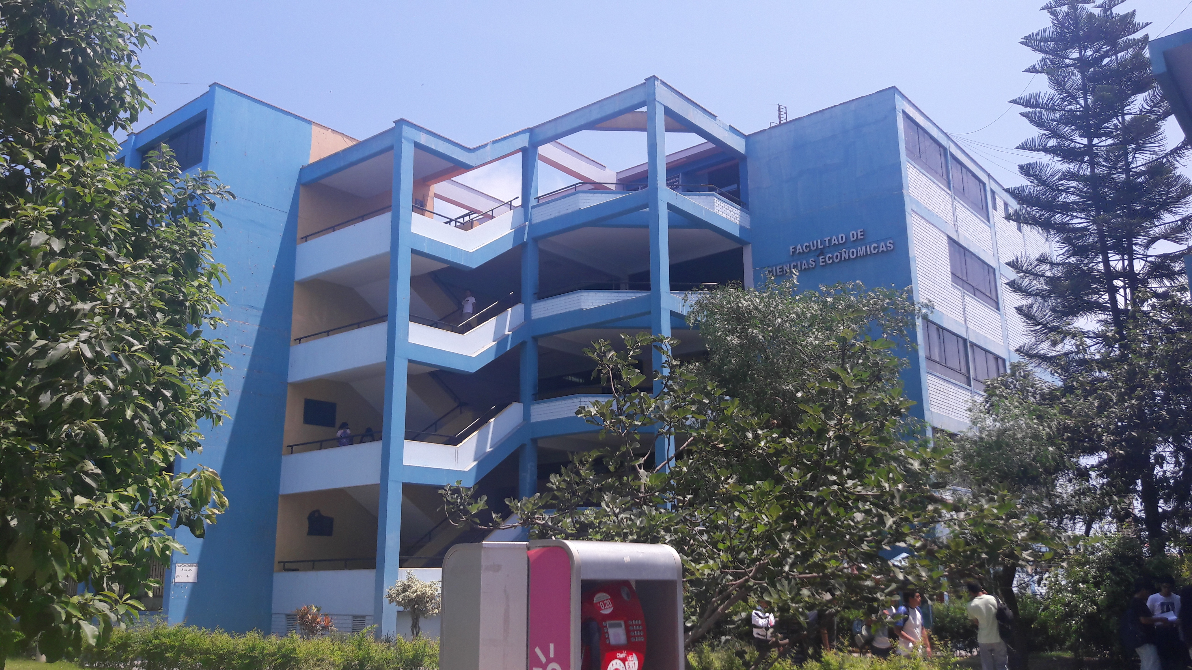 UNAC-Facultad de Ciencias Económicas